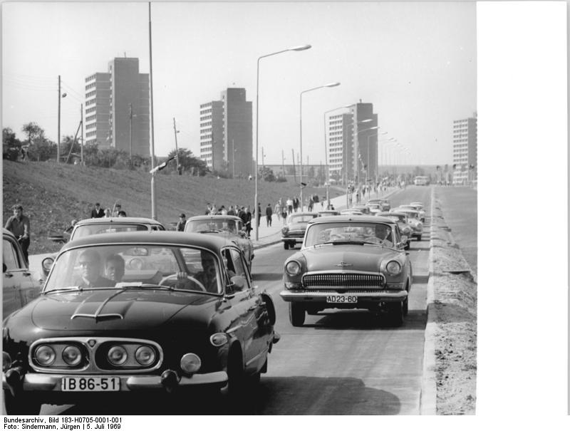 Rostock, Neue Verkehrsstaße Zentralbild Sindermann 5.7.1969-ge- Rostock: Neue Verkehrstraßen übergeben. Grünes Licht für neue Straßen hieß es am 5.9.69 in der Werft- und Hafenstadt , als am Vorabend der Ostseewoche u.a. ein weiterer Abschnitt der Nord-Süd-Magistrale eingeweiht wurde. Sofort nach der Übergabe setzte reger Verkehr ein.